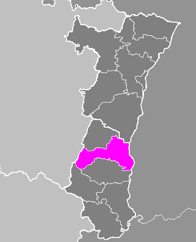 Maps of arrondissements and cantons of France: Arrondissement de Colmar.PNG (Région Alsace)